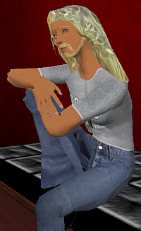 Dieses Bild zeigt meinen Avatar in Second Life.